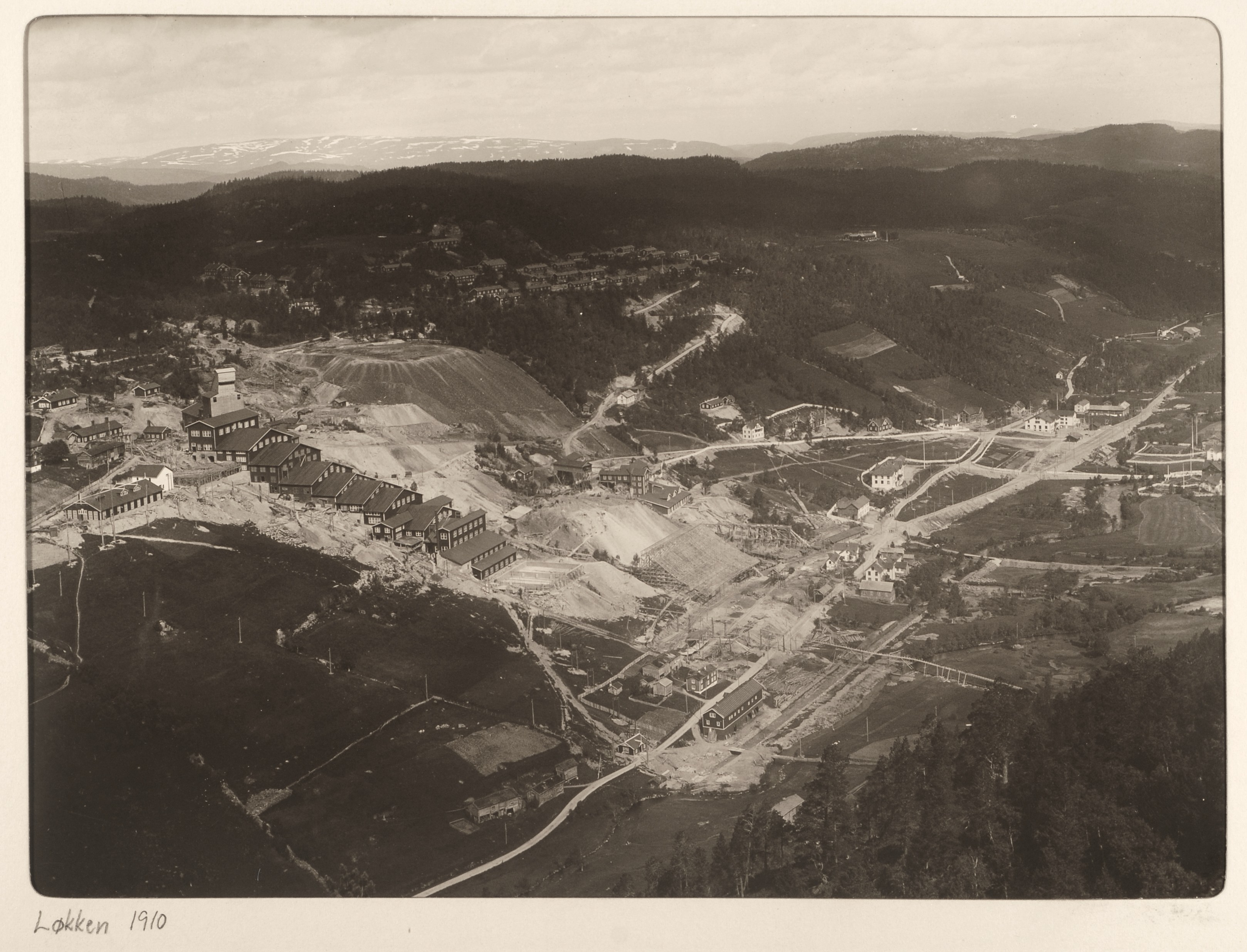 Løkken Verk in Meldal, Norway